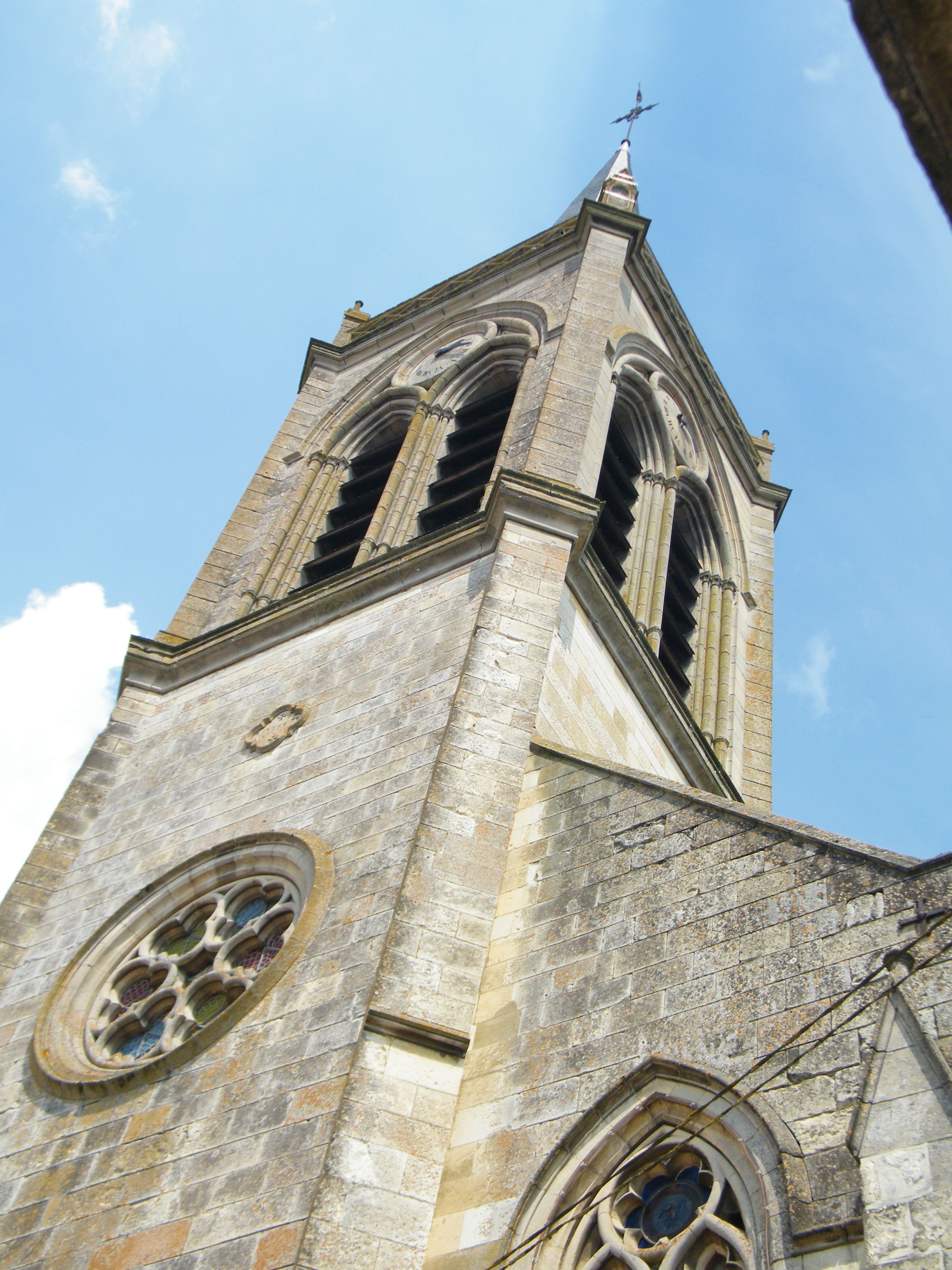 église.